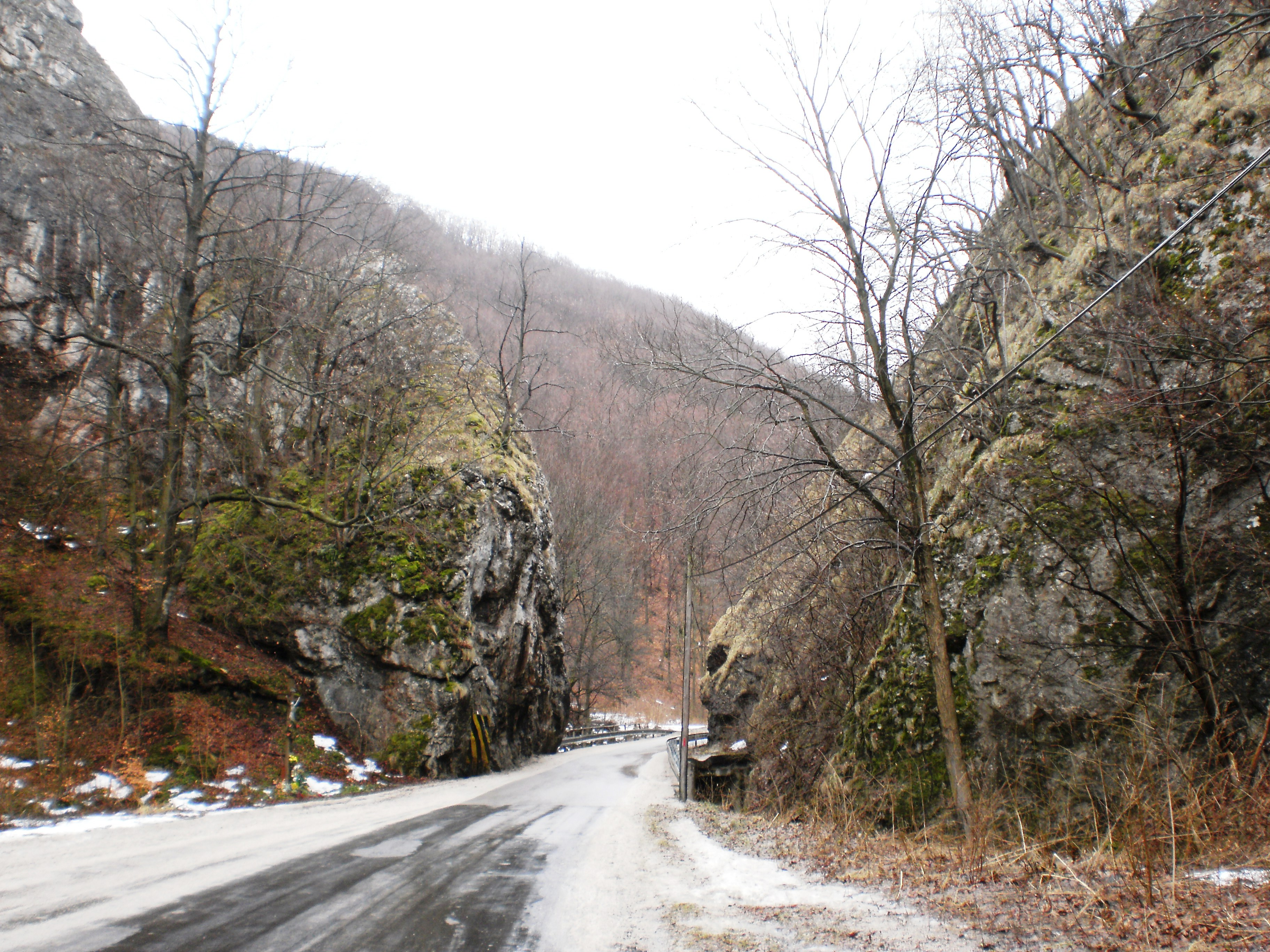 Cesta do Mojtína